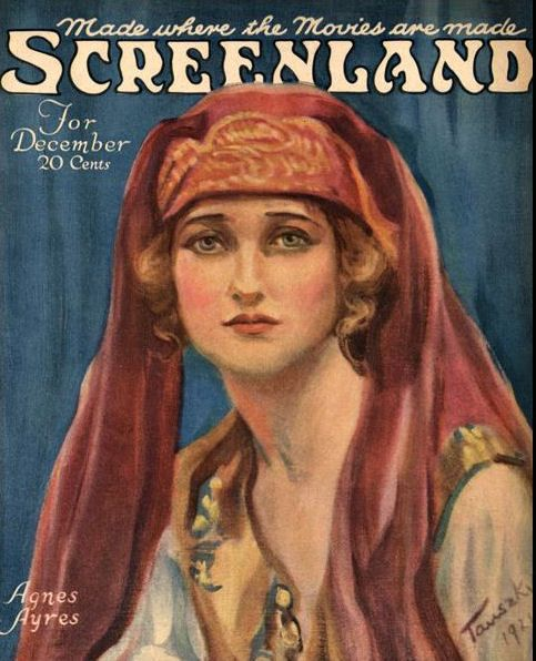 Agnes Ayres en couverture de la revue Screenland de décembre 1921, pour le film Le Cheik.